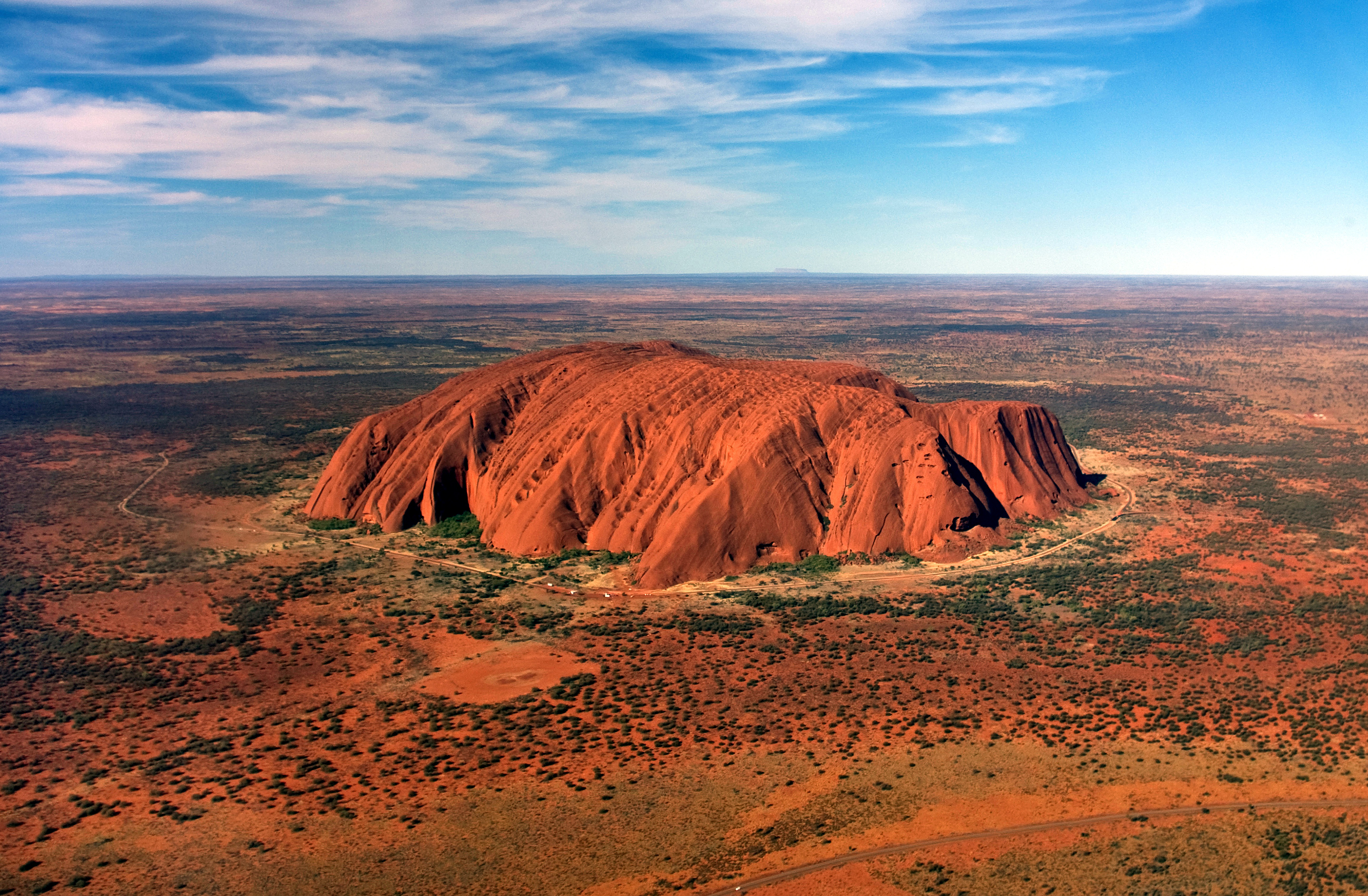 Uluru from Helicopter